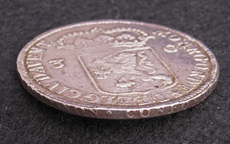 Opliggend randschrift op een provinciale zilveren drieguldenmunt van de stad Deventer, 1698.